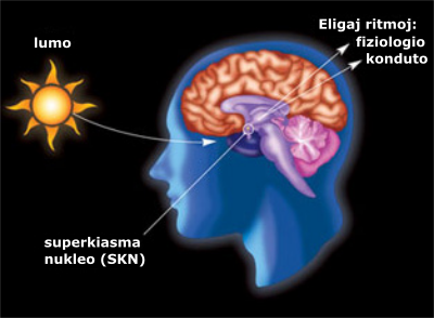 Lumo sinkronas la biologa horloĝo en la SKN, kaj la SKN sendas signaloj ke influas fiziologio kaj konduto.